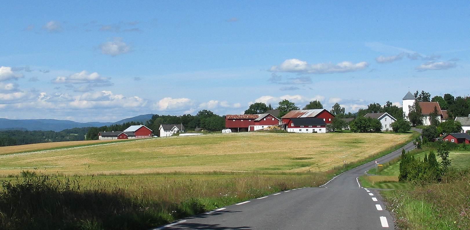 Fon i Re kommune i Vestfold.